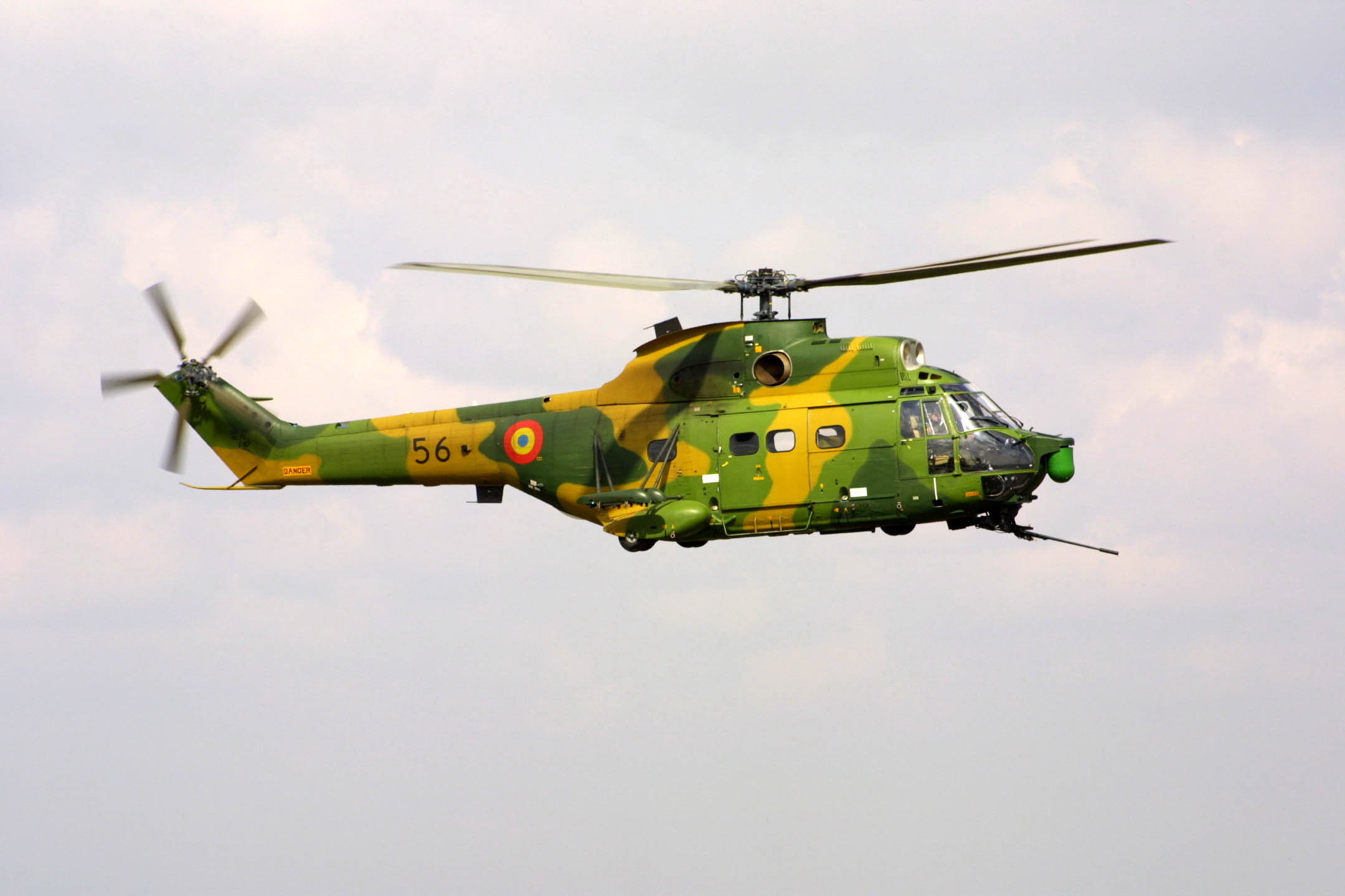 IAR-330 Puma SOCAT antitank gunship.